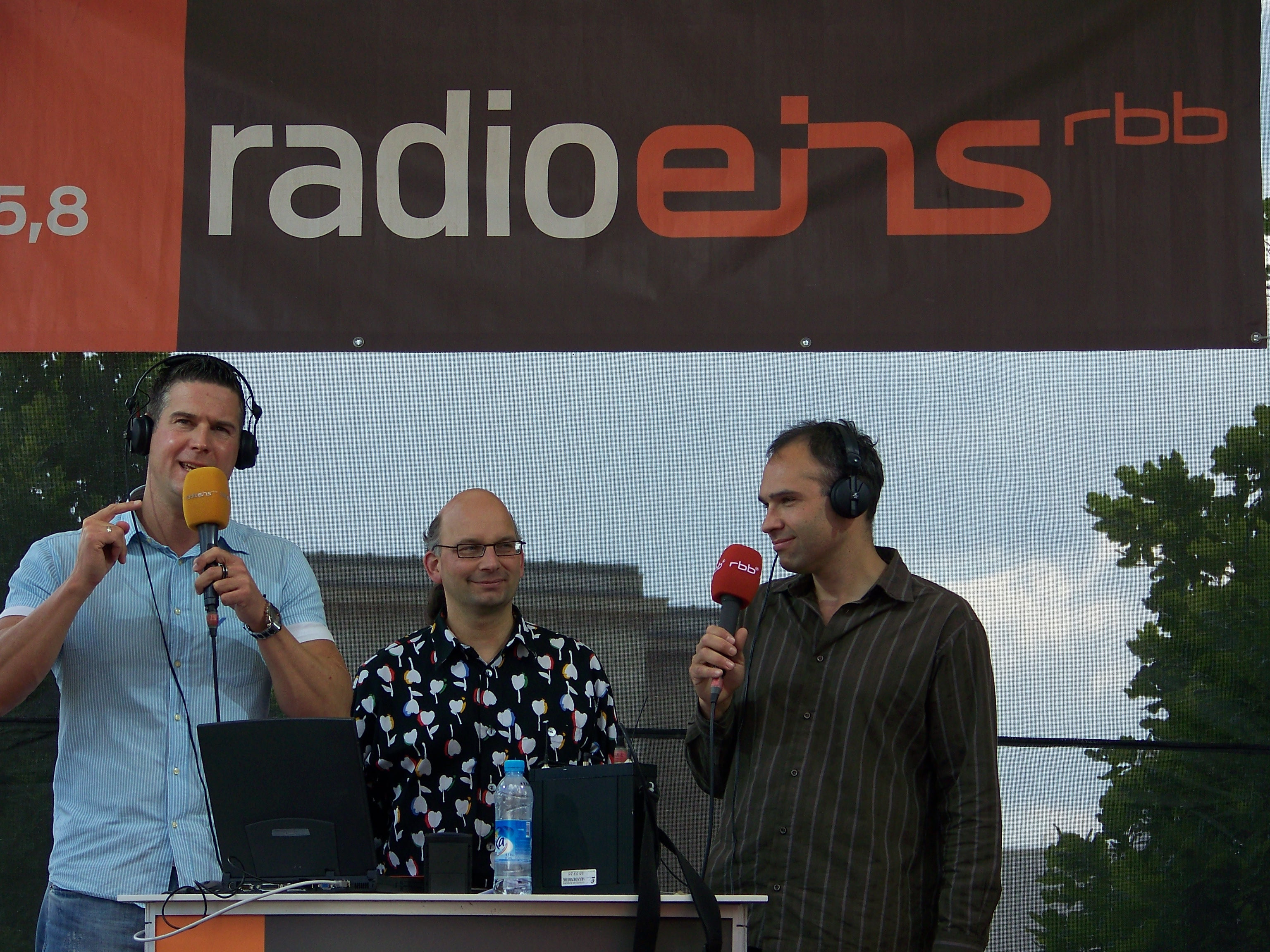 Sven Oswald - Georg Schnurer - Daniel Finger, radioeins "Escape" live vom rbb-Gelände Berlin - 2008-24-05